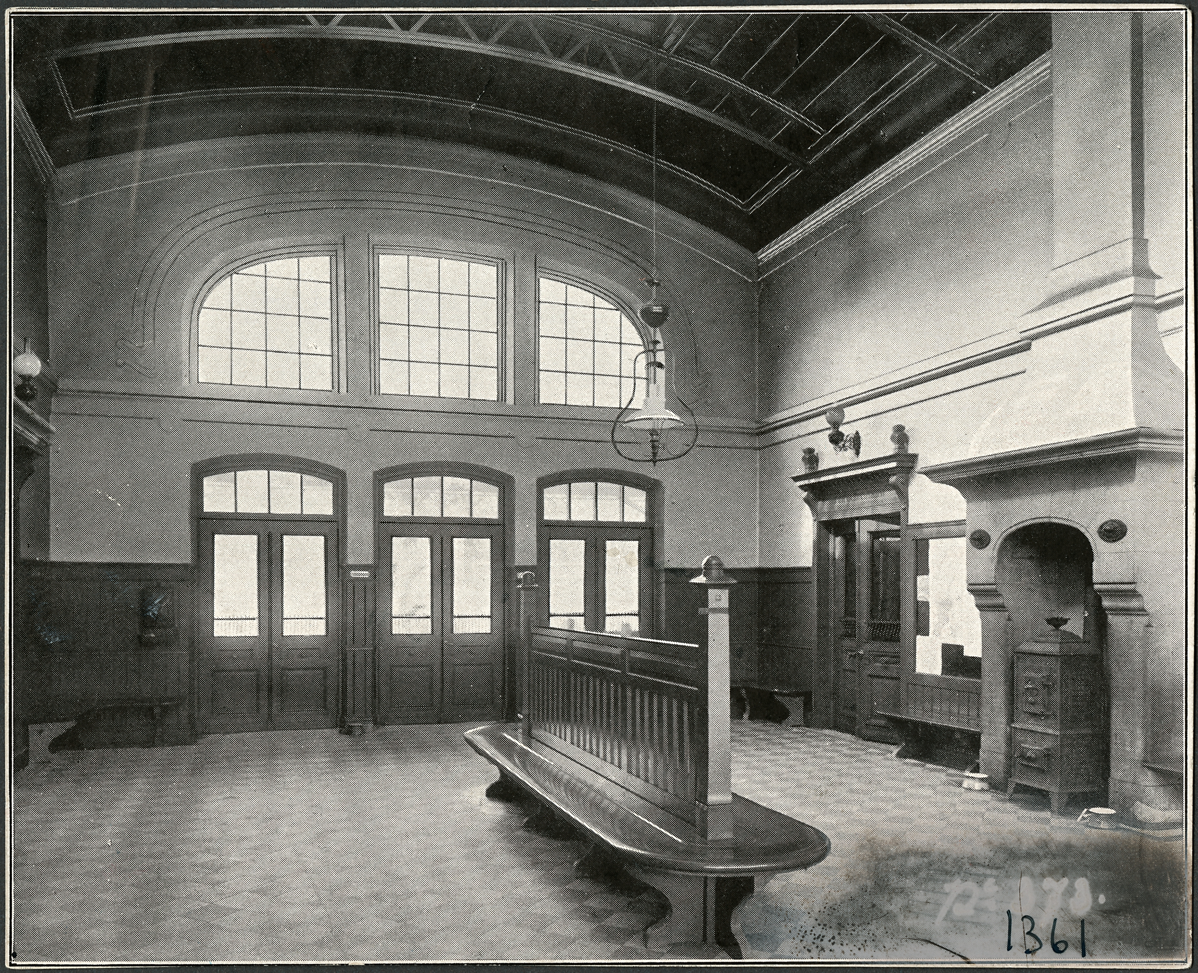 Metadata IDENTIFIER JvmKDAE06399 PART OF COLLECTION Järnvägsmuseets foton OWNER OF COLLECTION Järnvägsmuseet INSTITUTION Järnvägsmuseet DATE PUBLISHED January 5, 2019 DATE UPDATED February 7, 2019 DIMU-CODE 021018152760 UUID F68B9083-024B-456C-8981-8CB386179B95 IDENTIFIER JvmKDAE06399 SUBJECT Väntsalen på Partille station. AVBILDAD, ORT Sverige Västergötland Västra Götaland Partille Partille GENERAL SUBJECT TERM Interiör SPECIFIC SUBJECT TERMS Väntsal Belysning Add a comment or suggest edits History Fotografering 1900 - 1909 FOTOGRAF Fotograf okänd